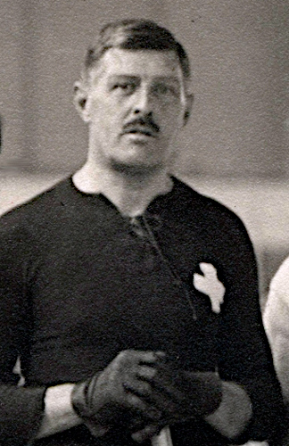 Ice hockey player Max Sillig representing the Swiss national ice hockey team at the 1920 Summer Olympics in Antwerp, Belgium. The picture is a crop out of a larger team photo taken inside the ice rink Palais de Glace d'Anvers. The ice hockey tournament at the 1920 Summer Olympics took place between April 23 and April 29.